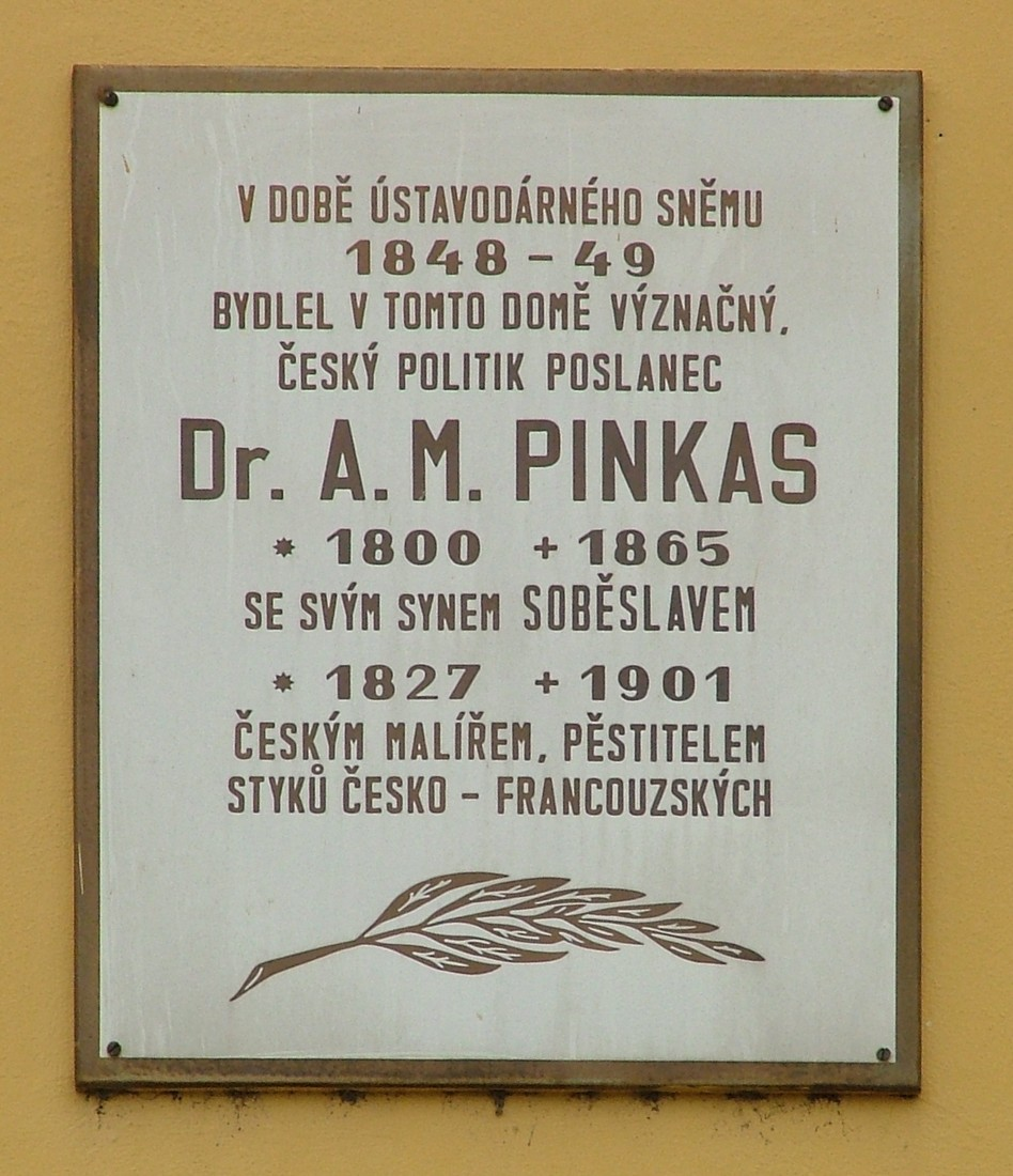 Velké náměstí 22, Velké náměstí 22/5, Kroměříž.